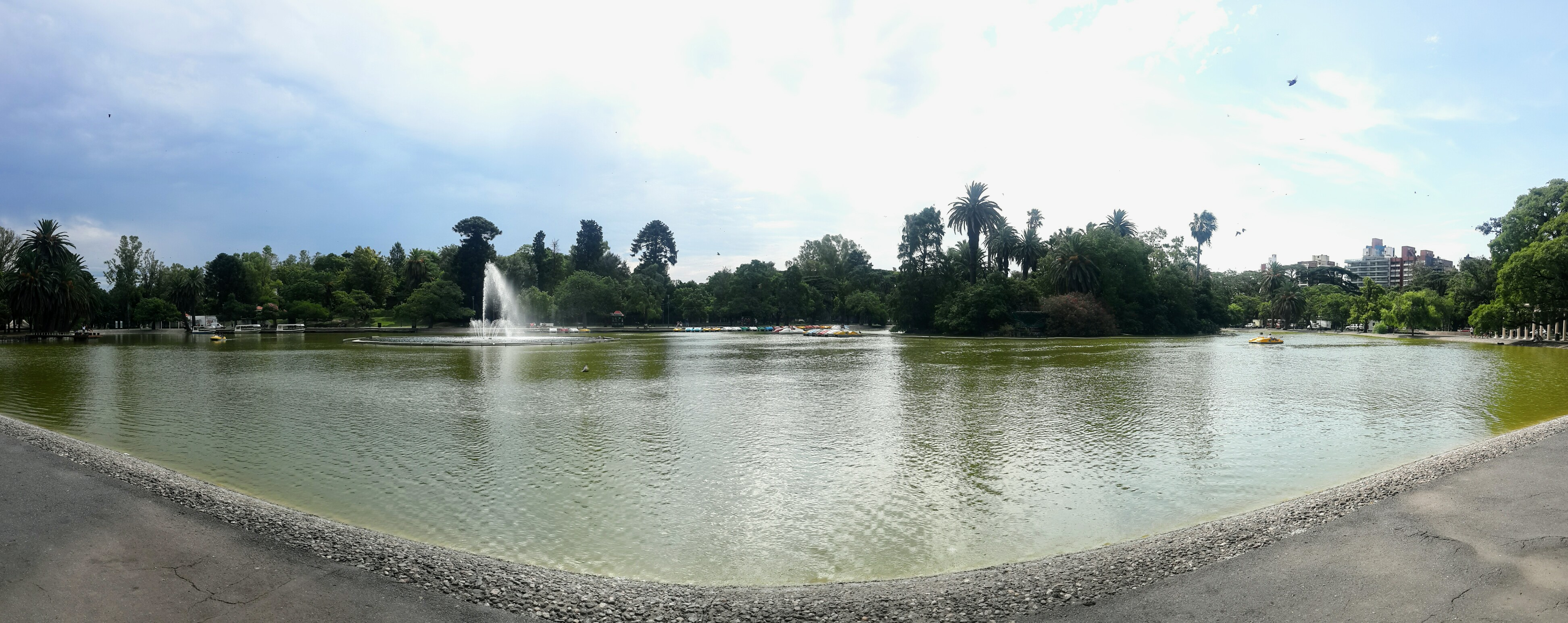 Vista Panorámica Parque Independencia de Rosario, Argentina.